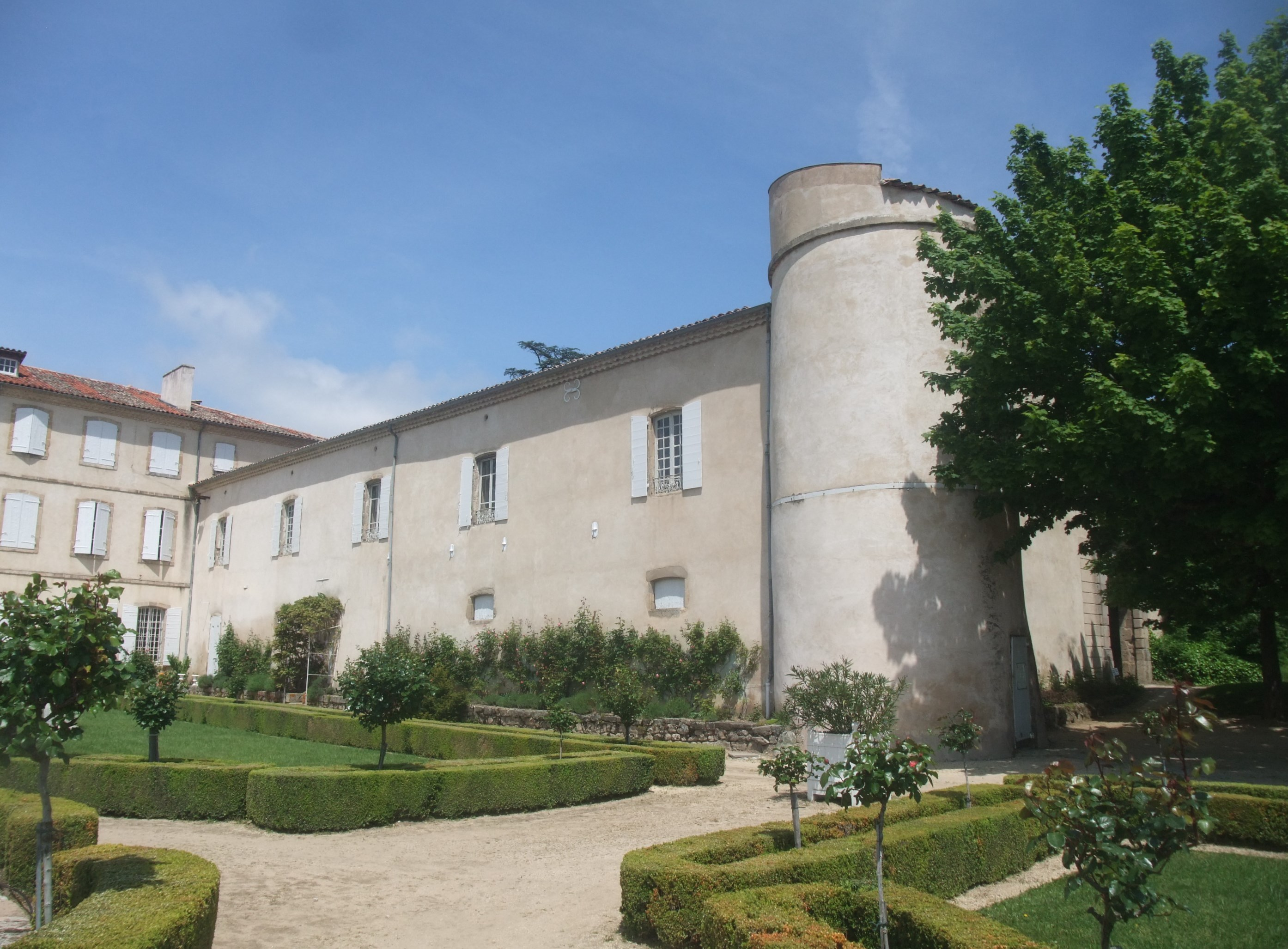 Savas Gourdan aile médiévale